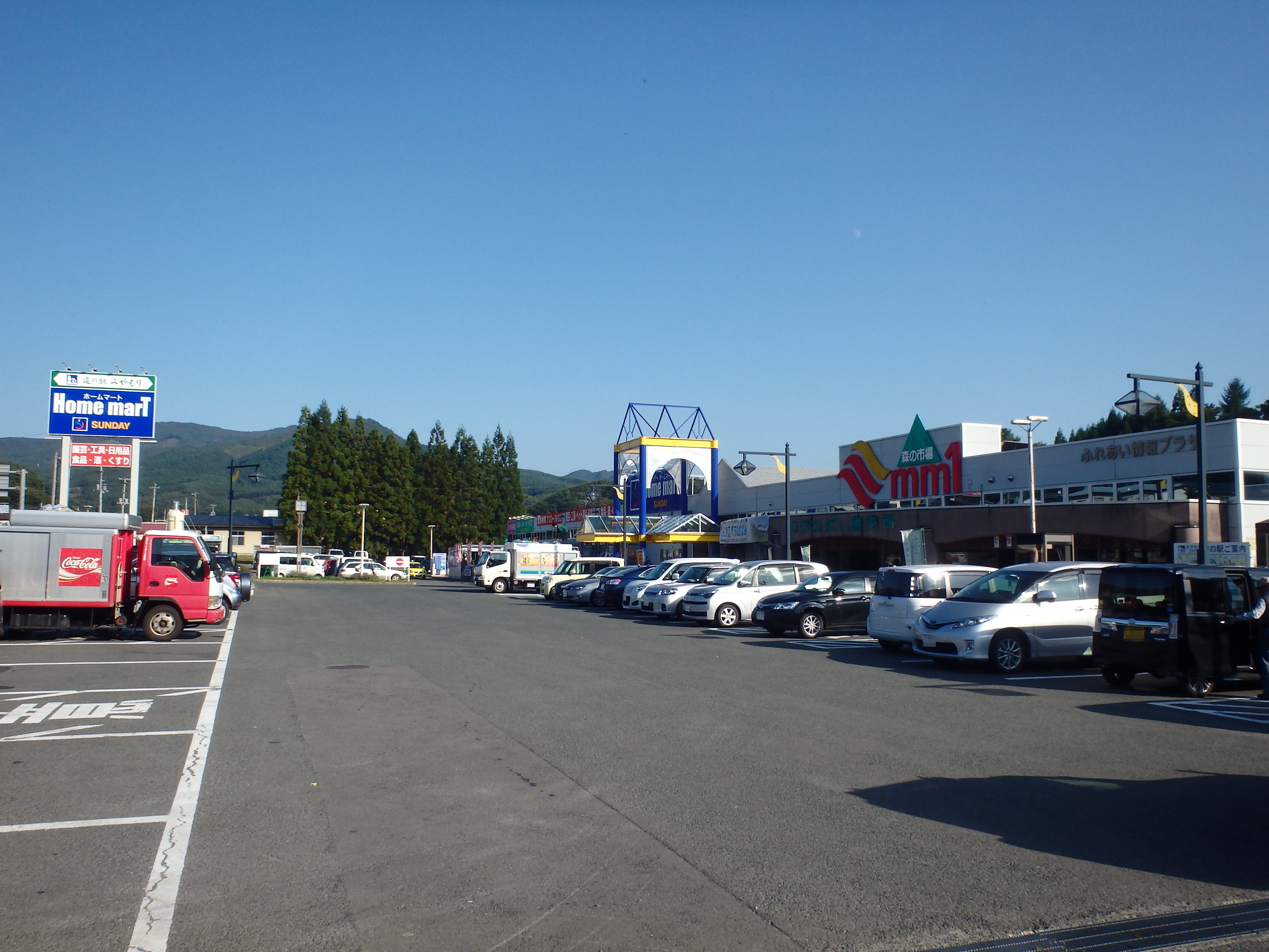 道の駅 みやもり（2015年9月）